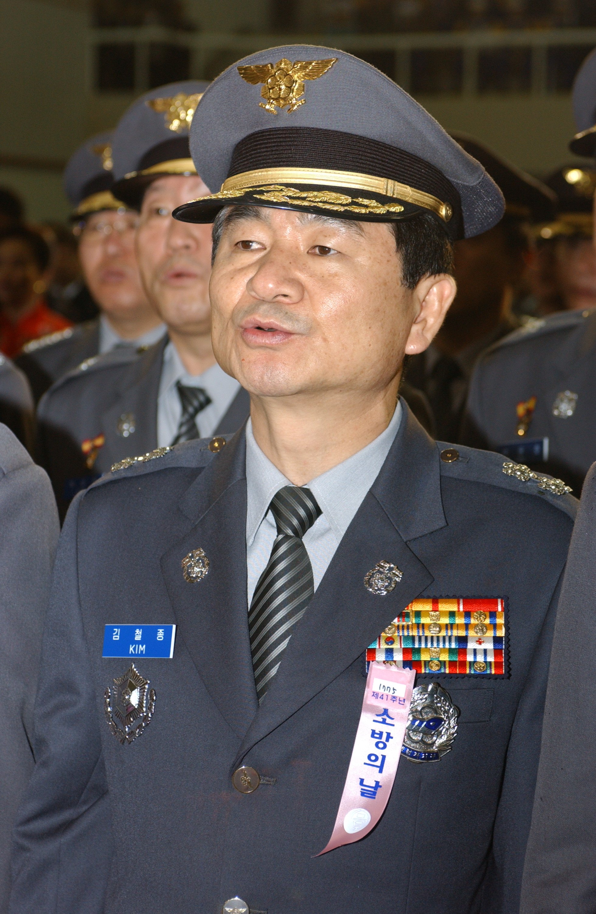 김철종, 2003년 11월 제41주년 소방의날 행사 (충청남도 천안시 중앙소방학교)